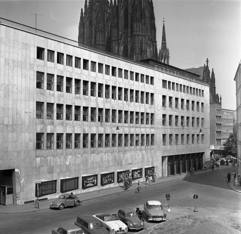 Stadtaufnahmen in Köln WDR-Funkhaus am Apellhofplatz